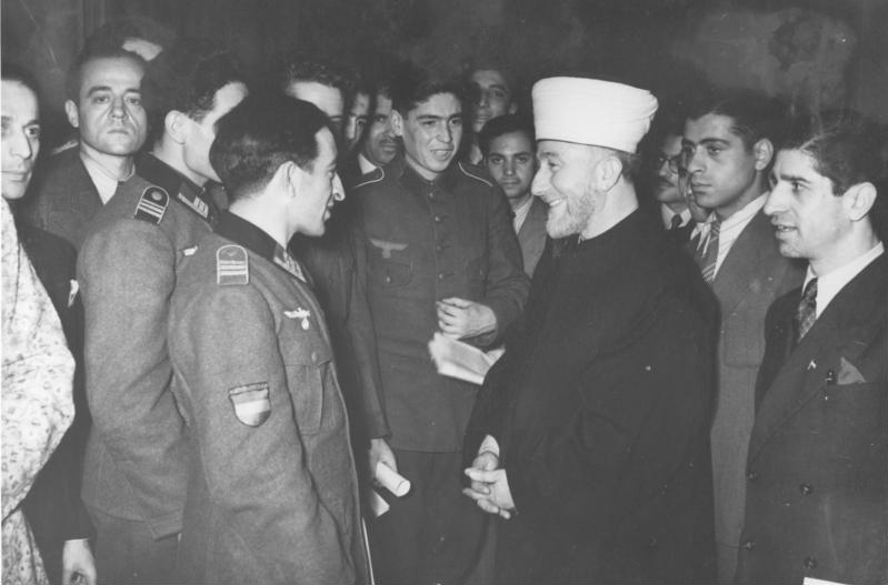 Berlin, Besuch Amin el Husseini Der Grossmufti von Jerusalem im Gespräch mit Islamischen Freiwilligen. Anlässlich des Id-u Adha, des grossen mohammedanischen Festes, wurde im Haus der Flieger zu Berlin eine Feier der Mohammedanischen Gemeinde veranstaltet, bei der der Grossmufti von Jerusalem das "Islamische Zentral-Institut" eröffnete. Der Grossmufti im Gespräch mit islamischen Freiwilligen die ebenfalls an der Feier teilnahmen. 19.12.42 Presse-Hoffmann [Berlin.- Amin el Husseini im Gespräch mit islamischen Freiwilligen, u.a. der "Legion Aserbaidschan"] Abgebildete Personen: Husseini, Amin al Hadj: Großmufti von Jerusalem, Vorsitzender des Obersten Islamischen Rates, (GND 11883679X)